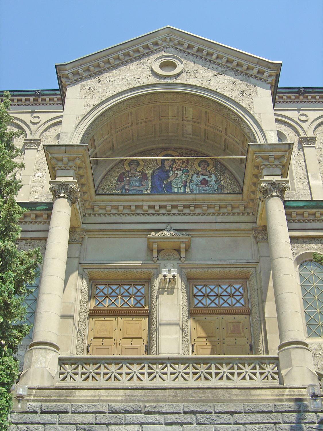 Das Südportal der Liebfrauenkirche in Zürich. Das Mosaik stellt Felix und Regula dar